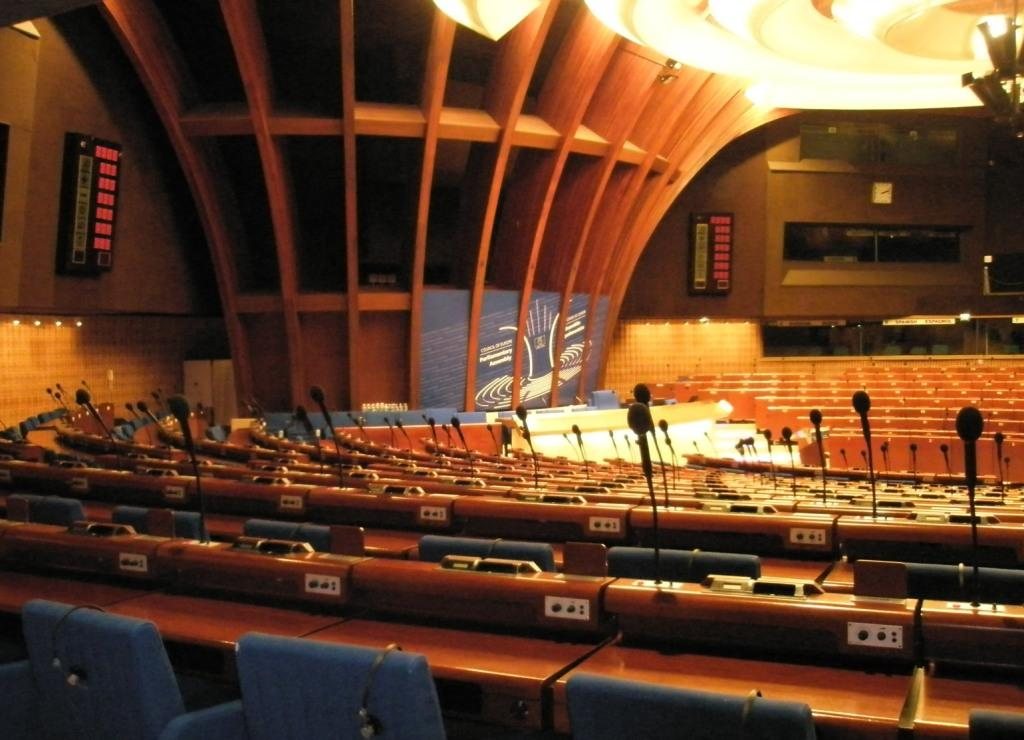 Council of Europe, Plenary hall (cs) Rada Evropy, Plenární sál (de) Europarat, Plenarsaal